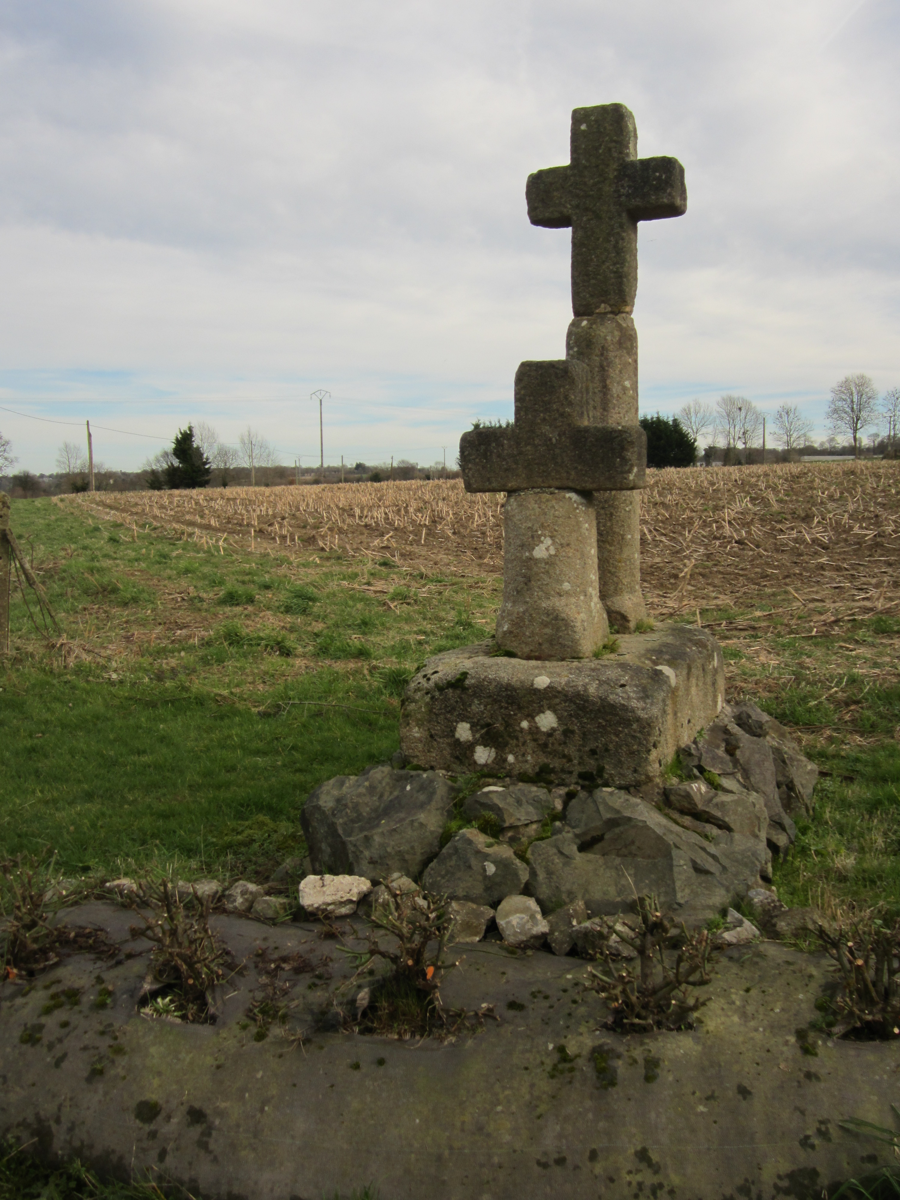 Guéhébert, Manche Ces croix datent de la Guerre de Cent Ans (1337-1453).